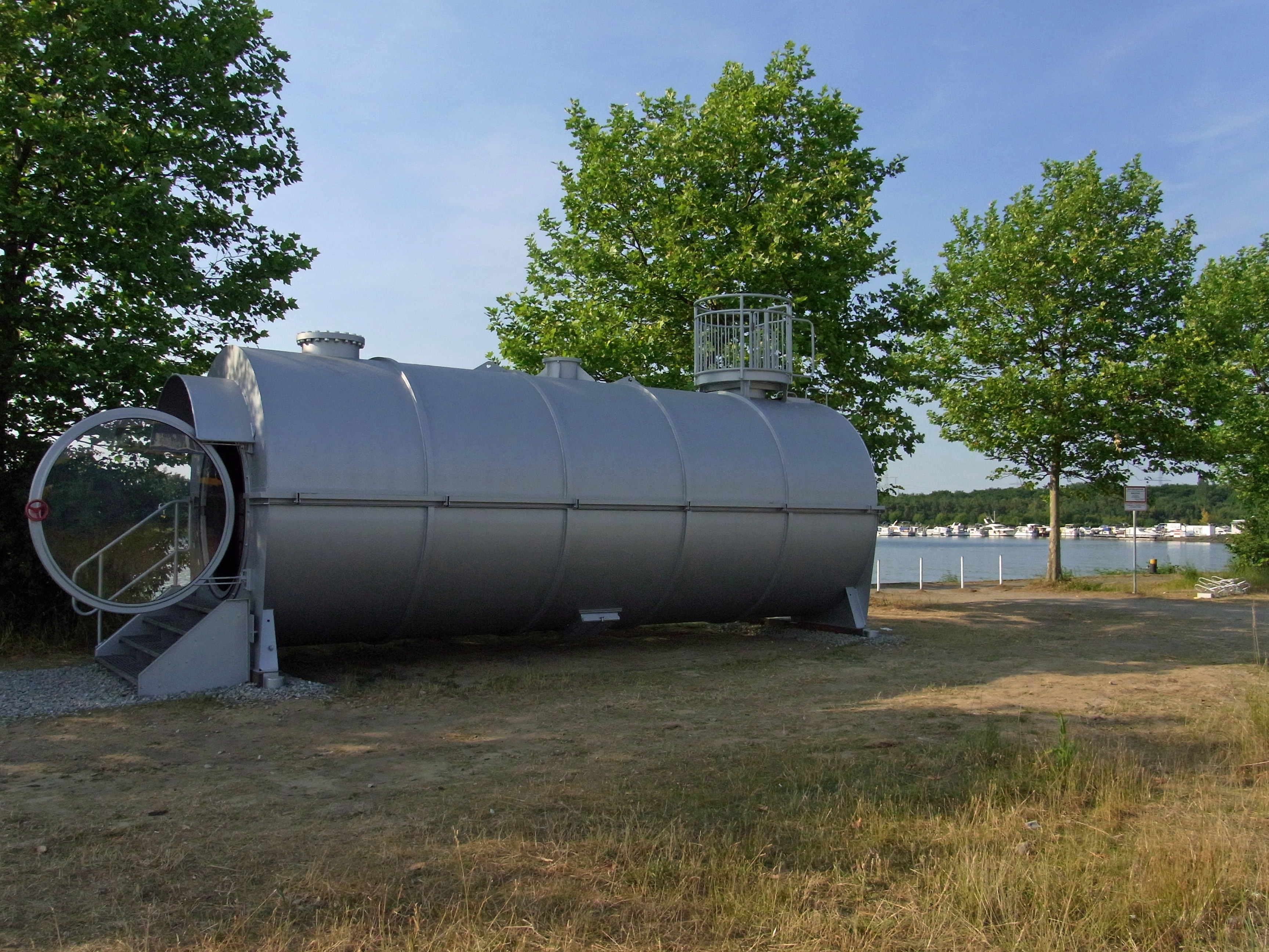 Emscherkunst.2010 Mark Dion: Gesellschaft der Amateur-Ornithologen